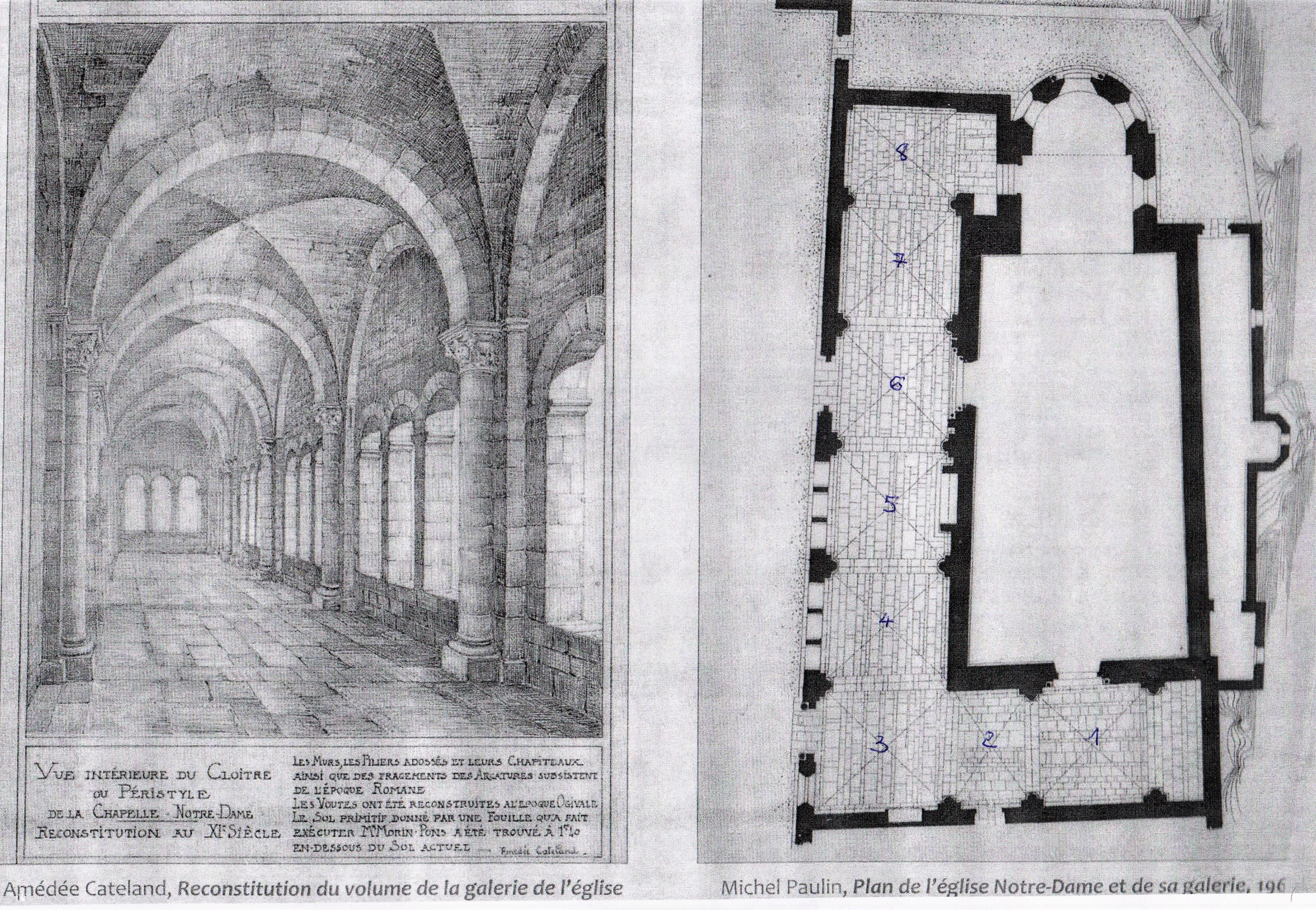 Ile Barbe Église Notre-Dame